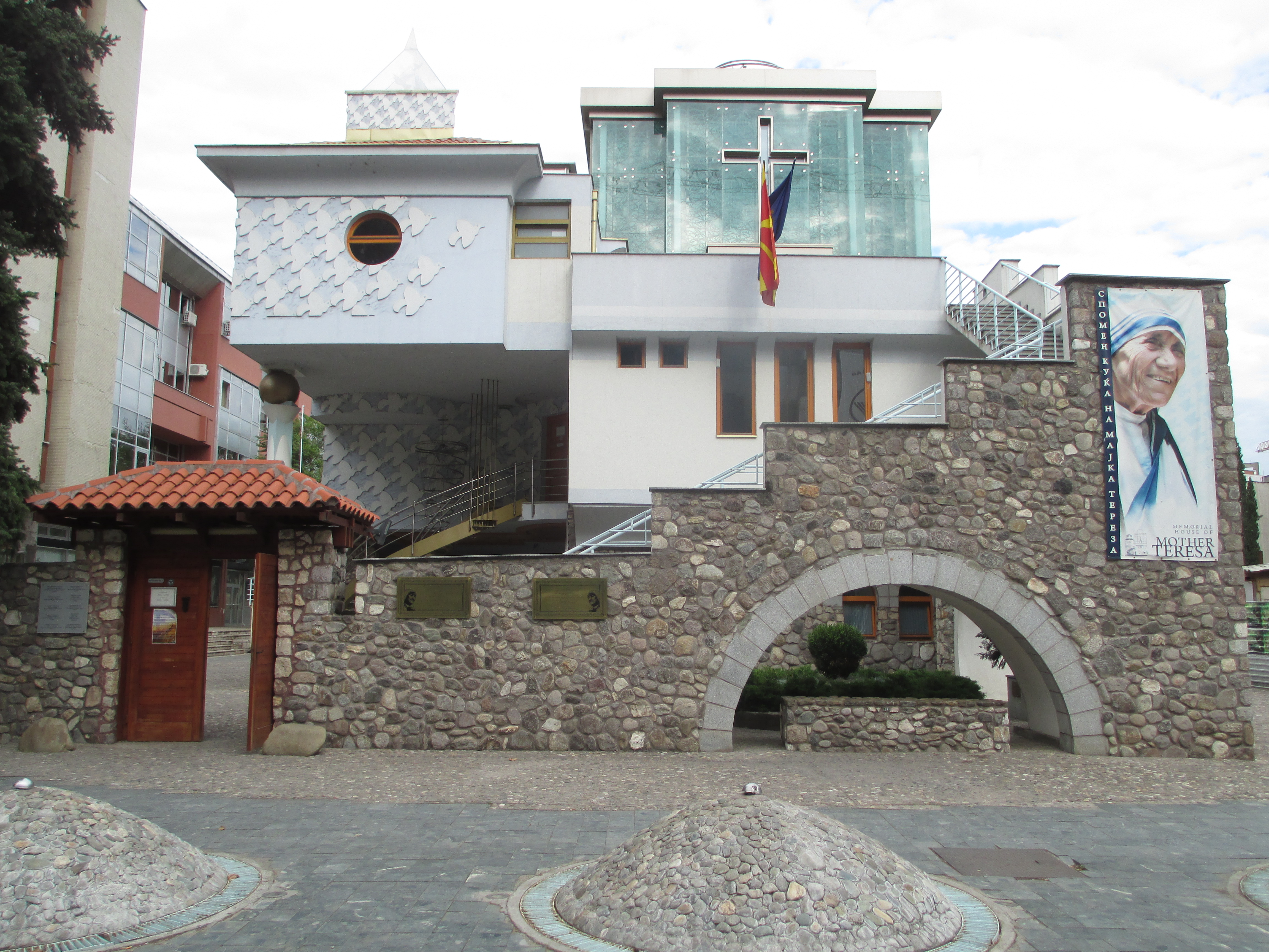 מוזיאון האם תרזה בסקופיה